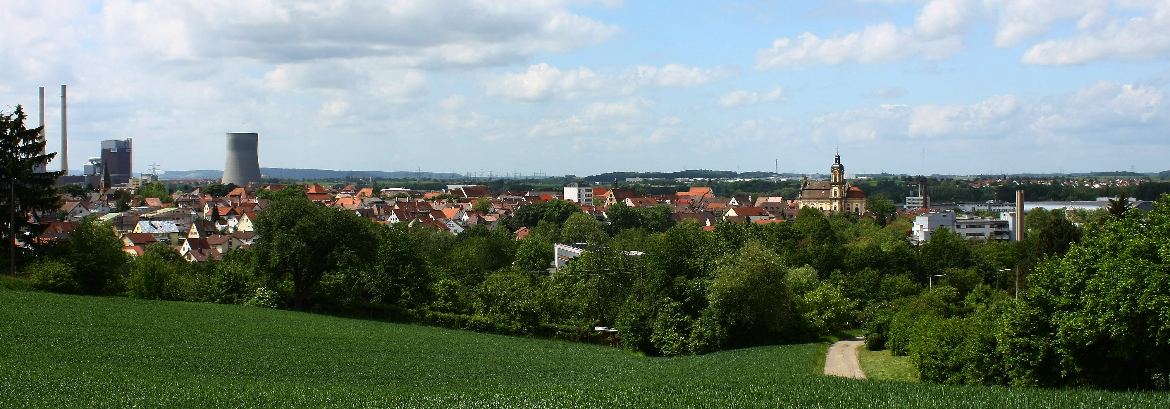 Panorama von Neckarsulm, Deutschland - Von rechts: Audi-Forum, Firma Kolbenschmidt, Stadtpfarrkirche St. Dionysius, Bildmitte: Stadtschloss, Große Kelter und Rathaus, ganz links: Kraftwerk Heilbronn, davor Evangelische Stadtkirche